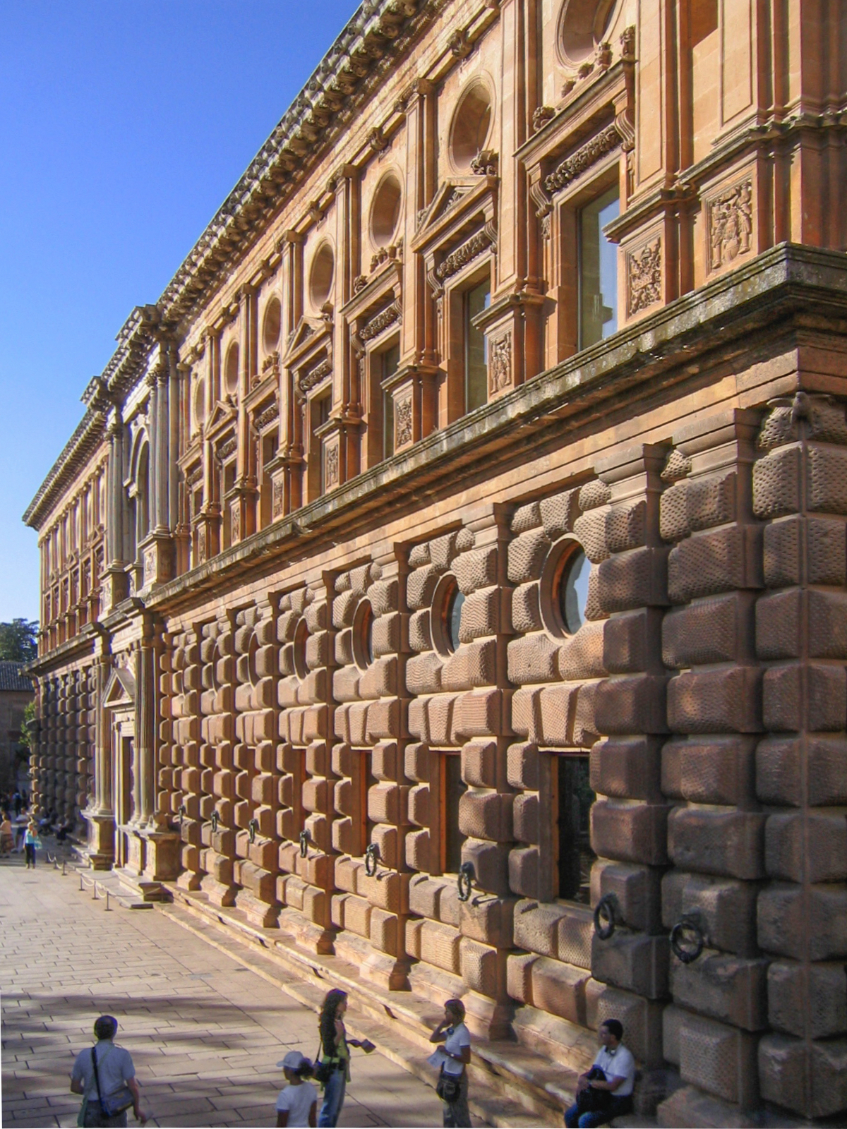 Palacio de Carlos V, Alhambra, Granada, Spain; South facade